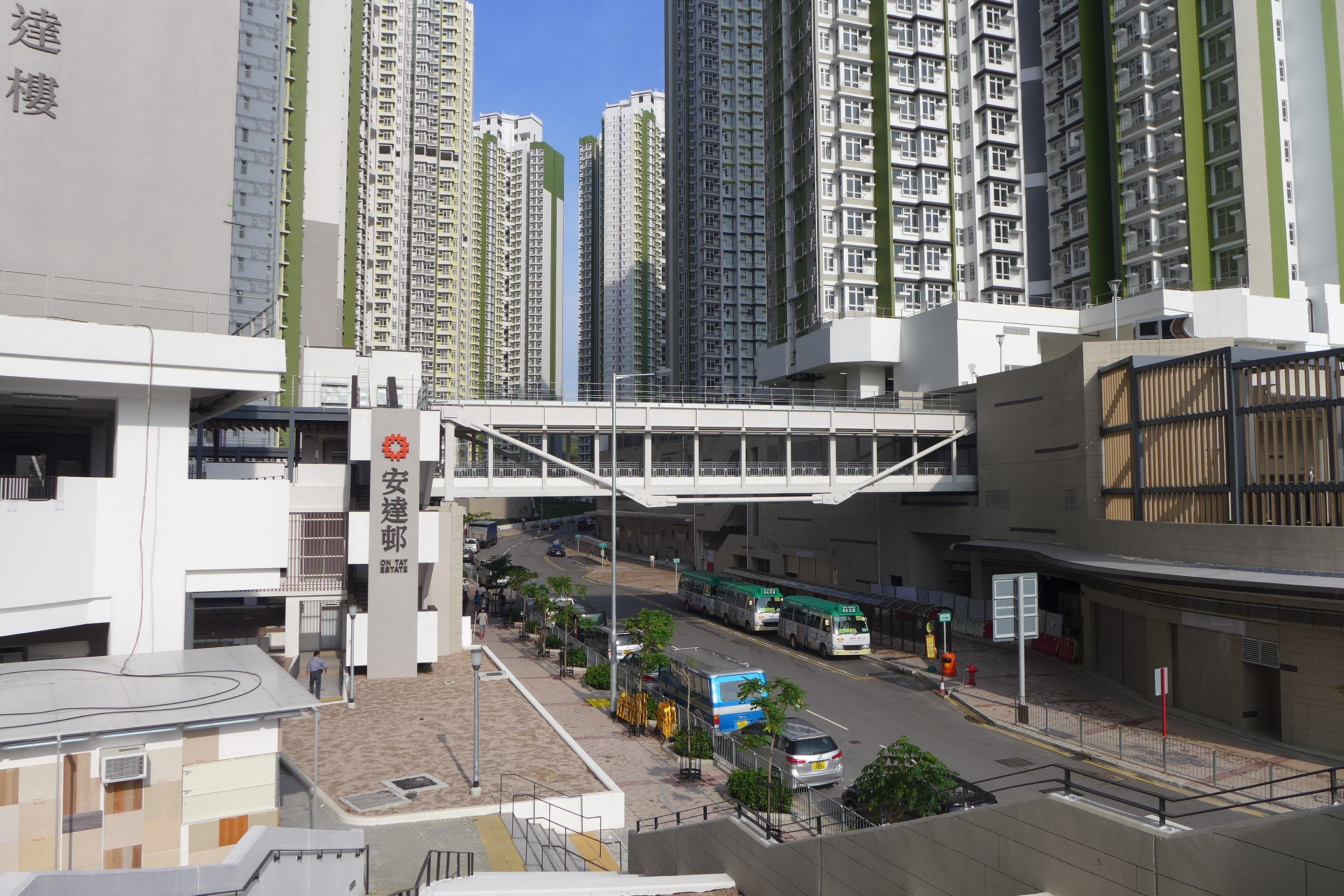 On Tat Estate